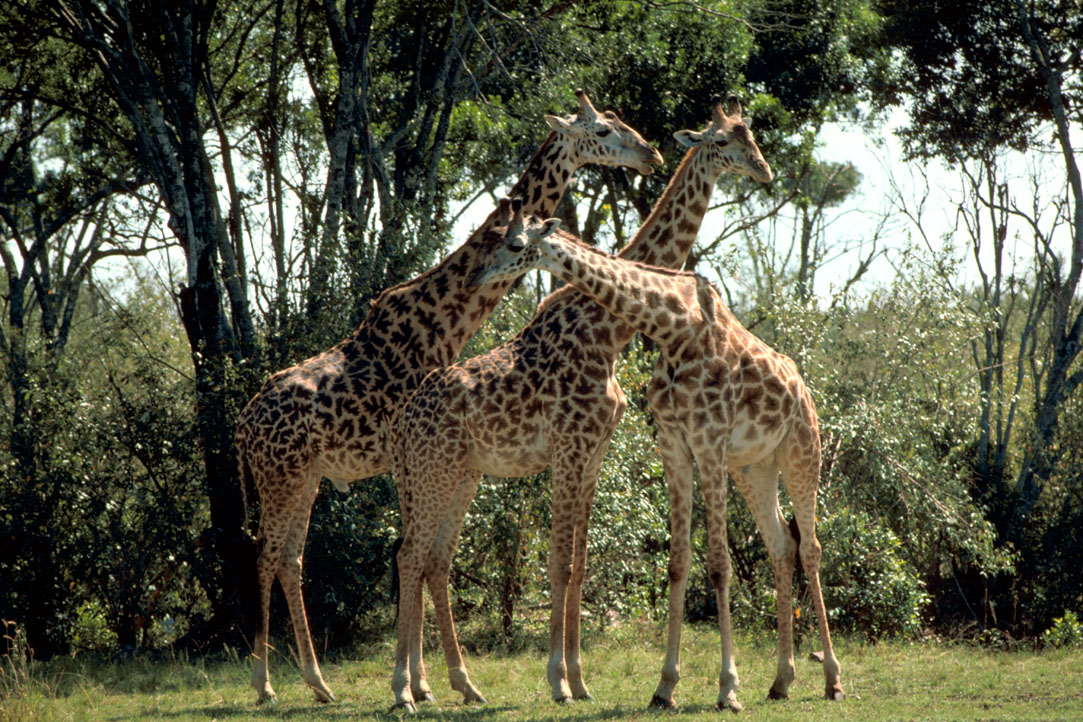 Unterart: Massaigiraffe